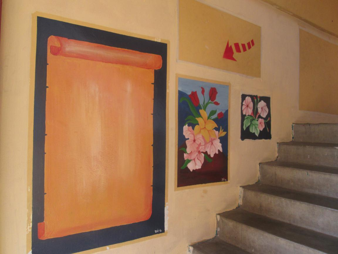 Proses Sebelum 9